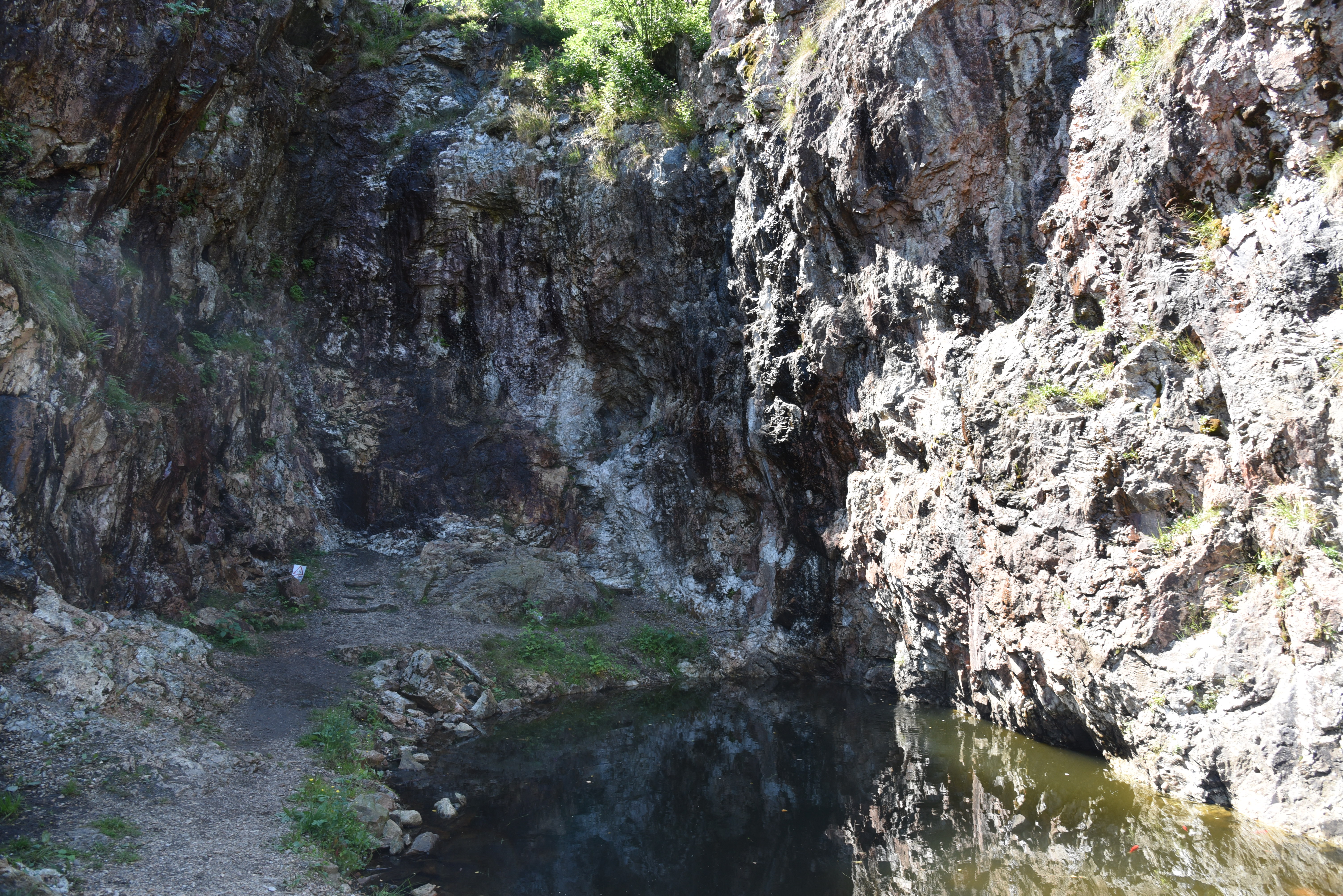 Gräne gruva i Holsljunga, Svenljunga kommun. I gruvan bröts mellan 1899 och 1932 fältspat och kvarts.